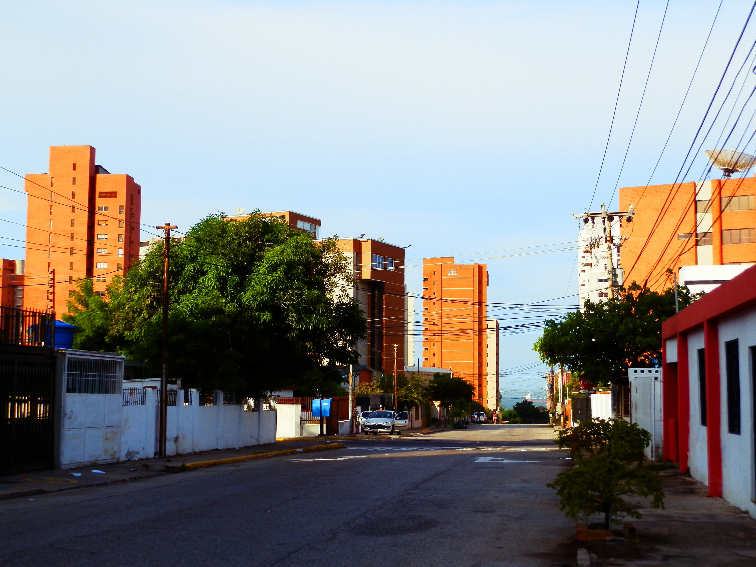 Edificios en Maracaibo, Venezuela